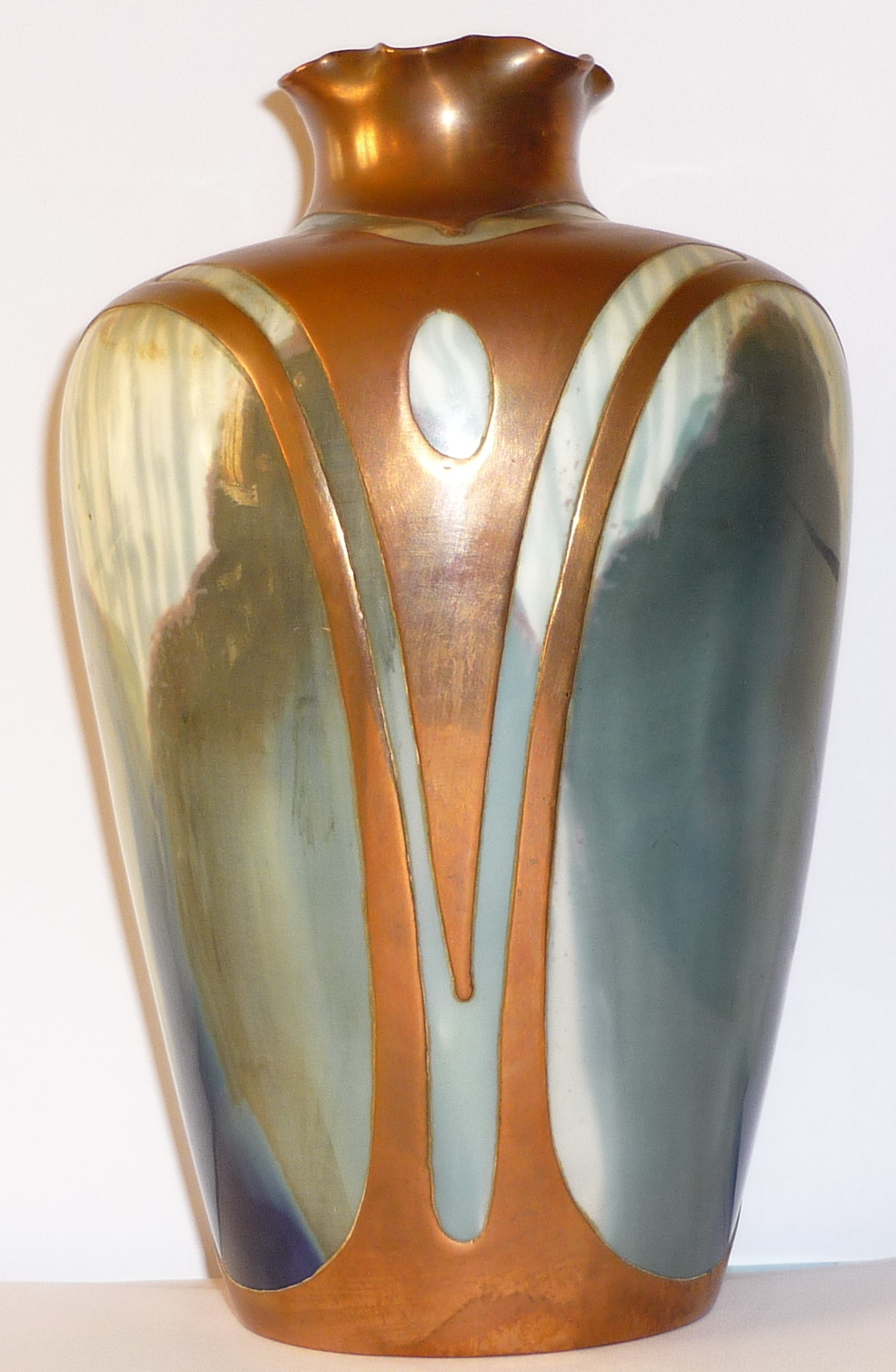 Vase de la fabrique de porcelaine Rosenthal Allemagne, époque Art Nouveau (Jugendstil), vers 1900, hauteur : 18 cm, marque « Rosen X thal » gravée sur la base Rosenthal mark engraved on the bottom of this vase.